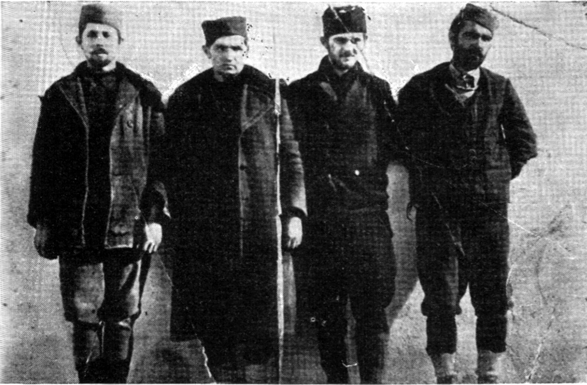 Srpskohrvatski / српскохрватски: Članovi okružnog komiteta KPJ Čačka pred streljanje na Banjici, 1942.